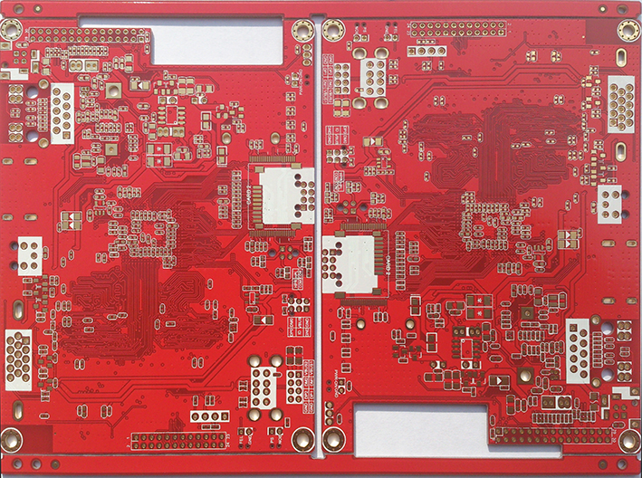 برد مدار چاپی مالتی لایر - 8 لایه - آبکاری طلا تولید شده توسط عرش گستر